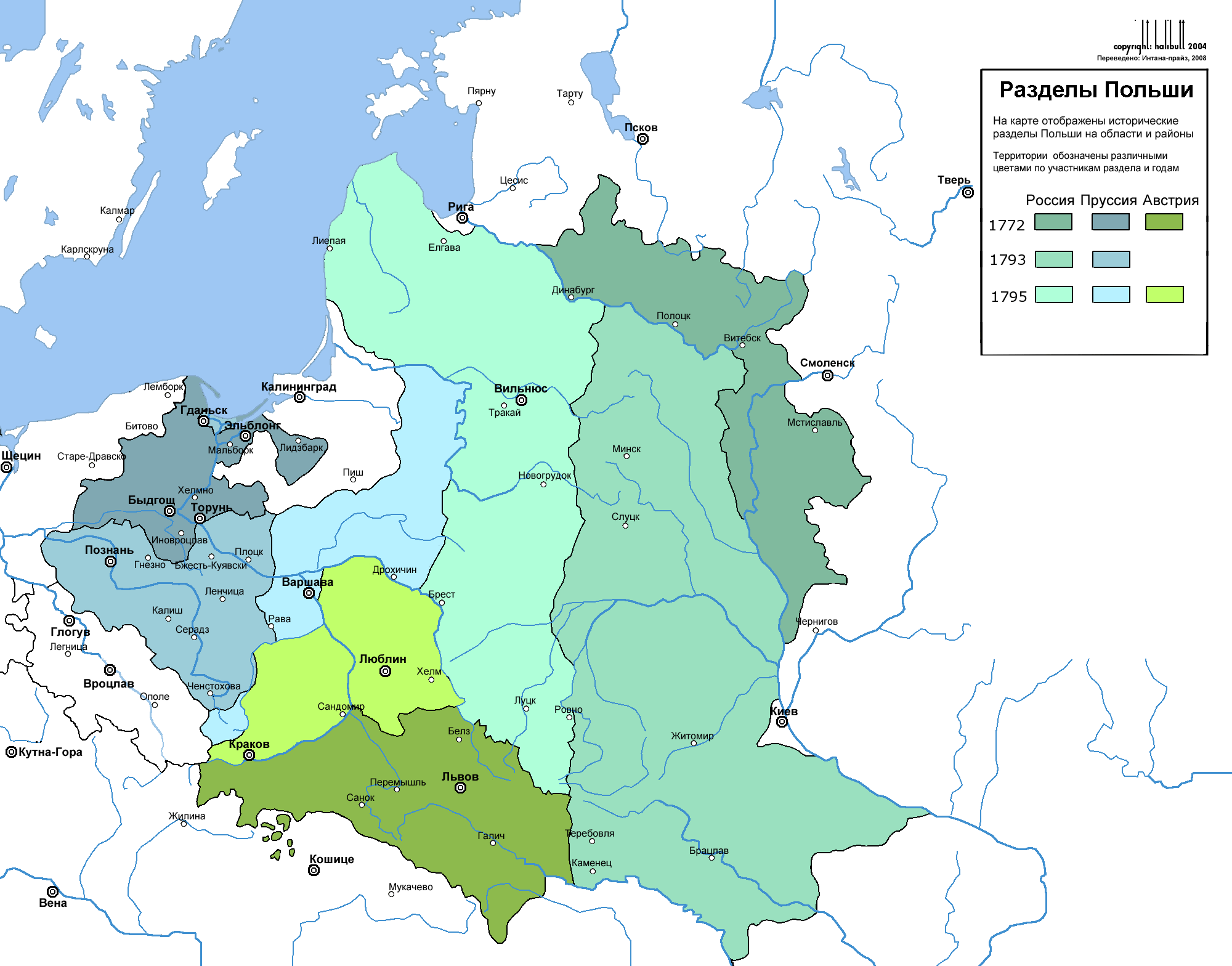 Карта разделов Речи Посполитой. При создании использованы современные названия городов. (Перевод файла Image:Rzeczpospolita Rozbiory 3.png)